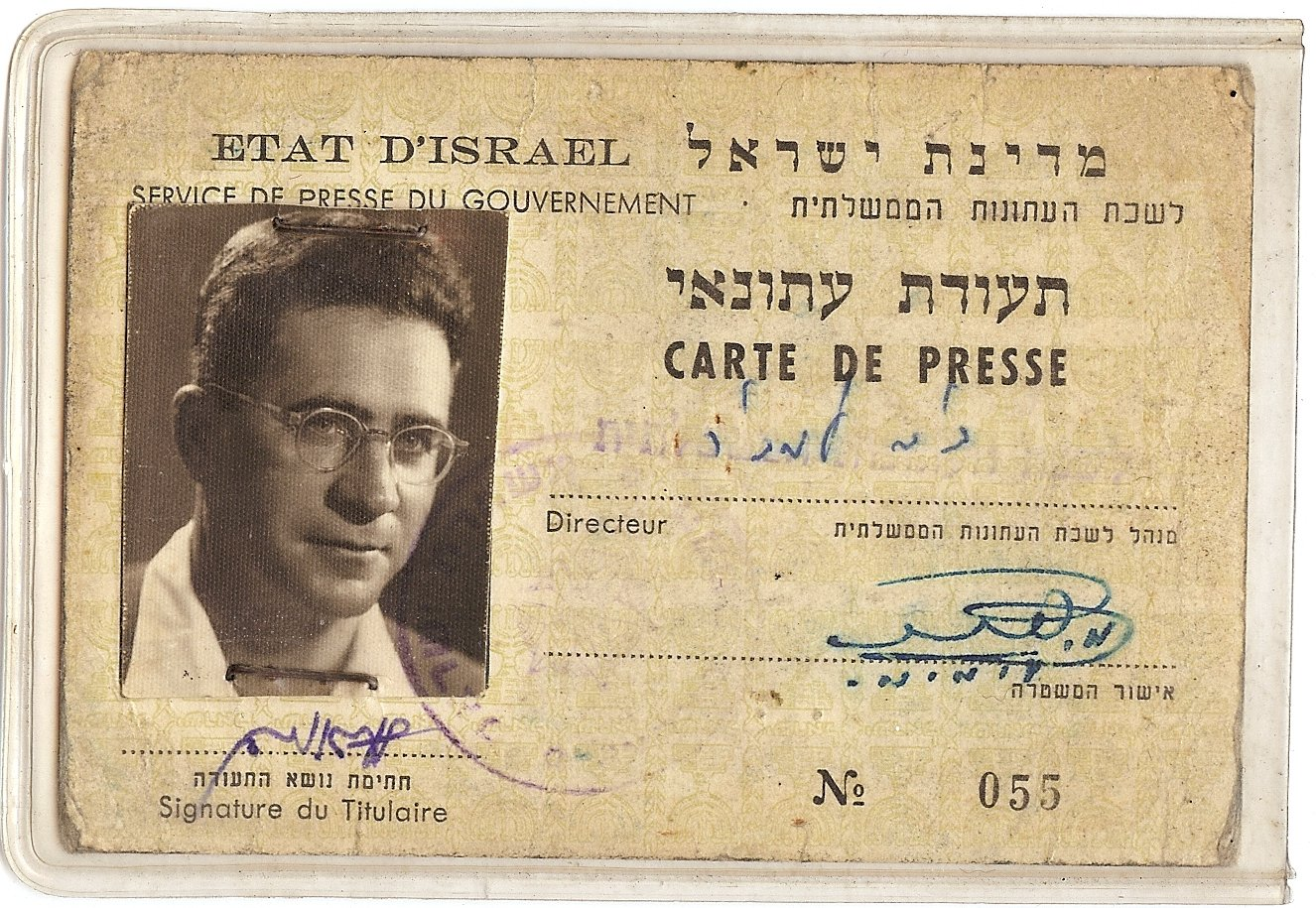 תעודת העתונאי של אברהם בר אורין